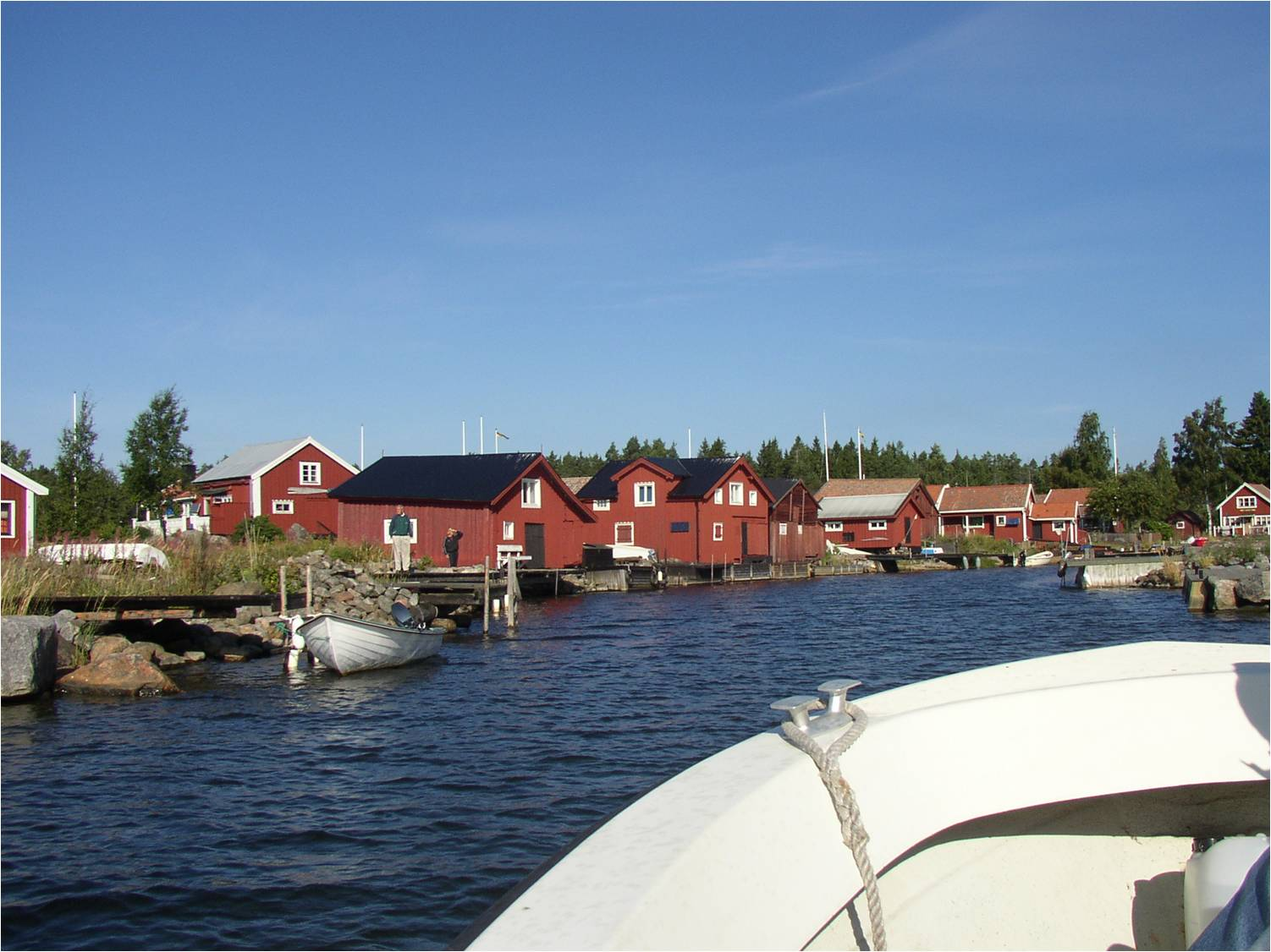 Agö hamn från söder.